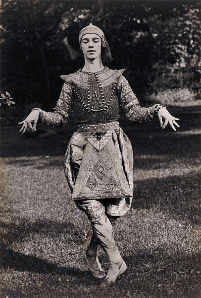 Nijinsky in Danse Siamoise(Siamese Dance)in Les Orientales